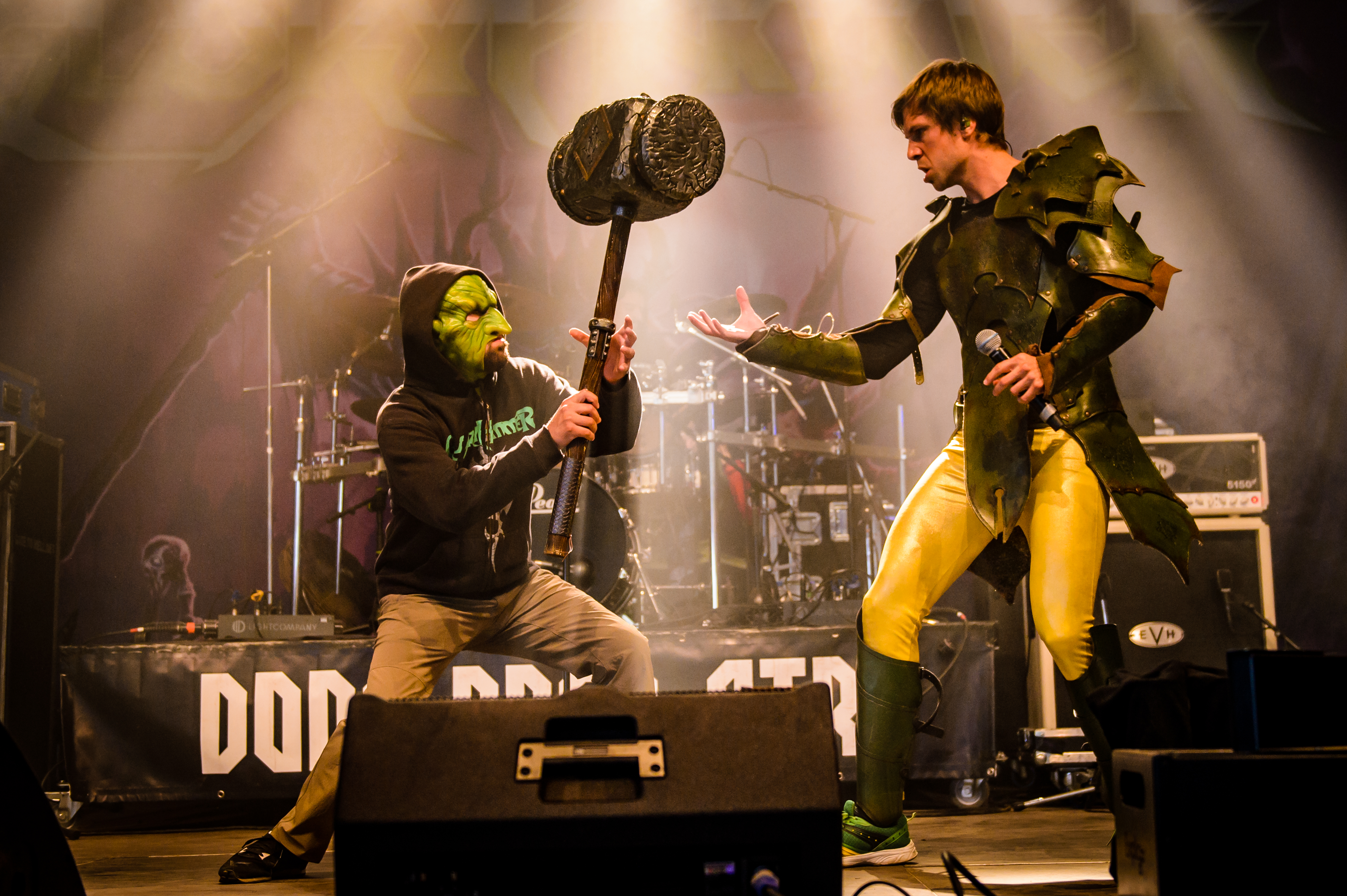 'Dong Open Air 2017; Neukirchen-Vluyn': 'Gloryhammer'